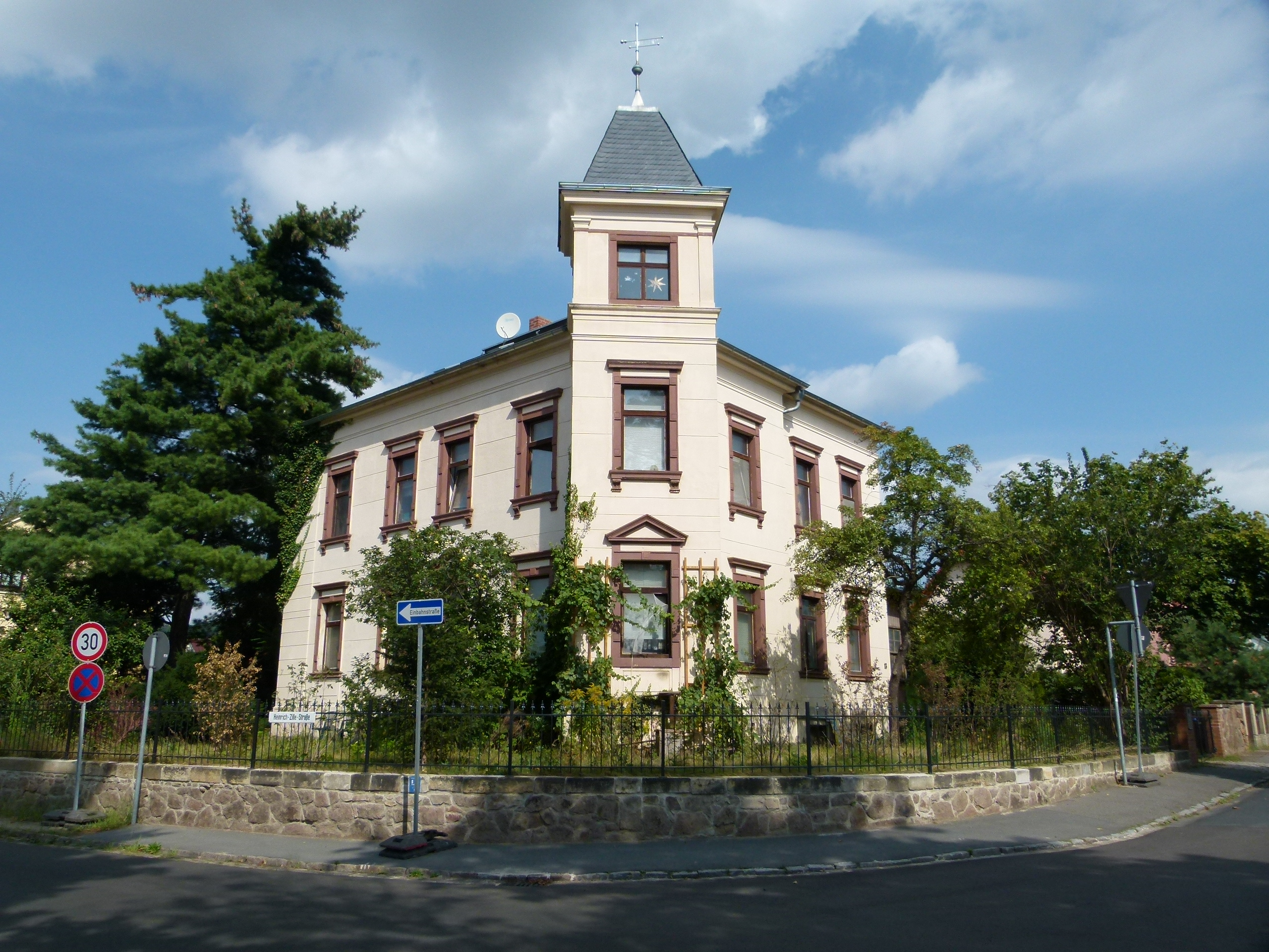 Denkmalgeschütztes Haus, Ledenweg 13, Radebeul, Sachsen